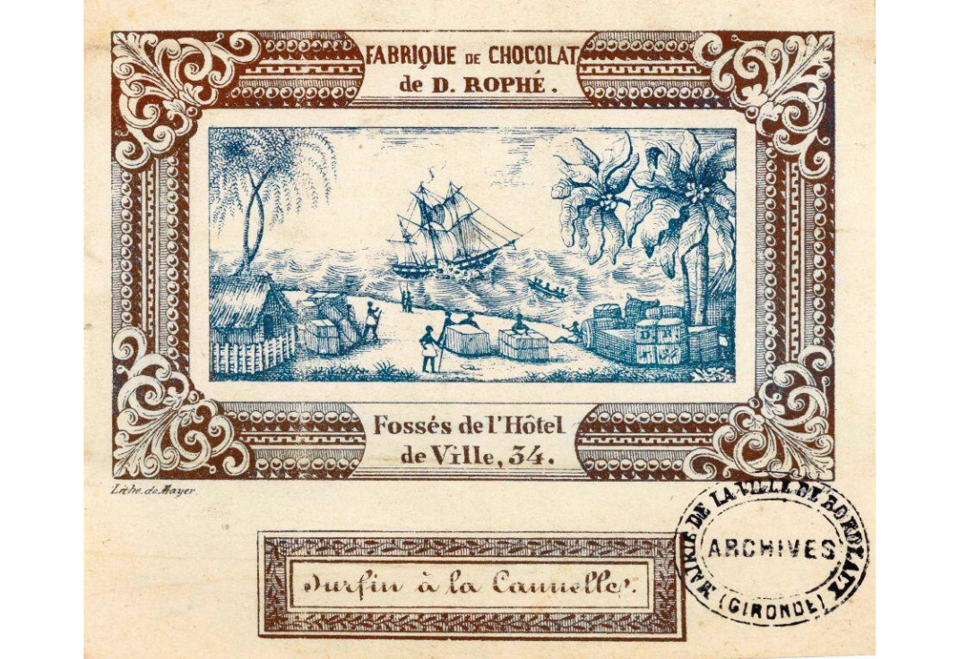 Vignette publicitaire de la chocolaterie de Daniel Rophé, fossés de l'Hôtel de Ville (actuel cours Victor Hugo), à Bordeaux, XVIII-XIX siècles.